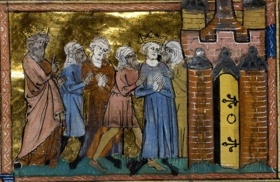 Septième croisade: Arrestation de Louis IX of France. (Bibliothèque nationale de France, Français 22495, fol. 294v)